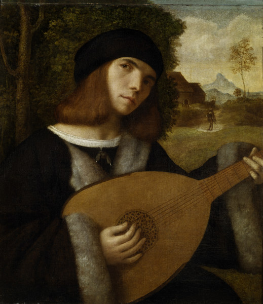 The Lute Player // Musée des Beaux-Arts, Strasbourg, France